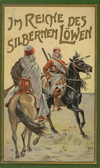 Im Reiche des silbernen Löwen (May)